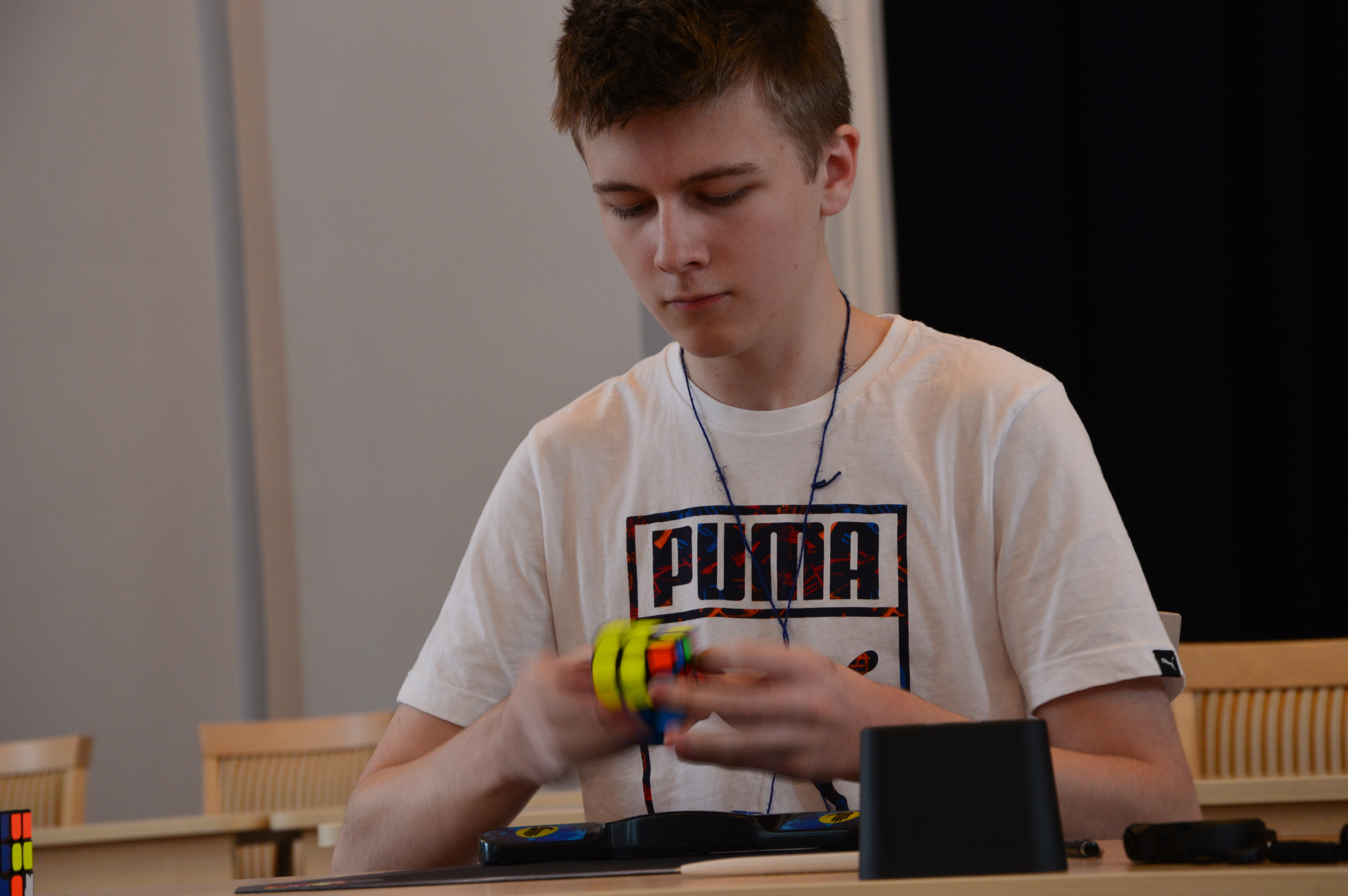 Vilius Ribinskas (LIT) lahendamas 3x3 kuubikut võistluse Tallinn Open 2018 finaalis.